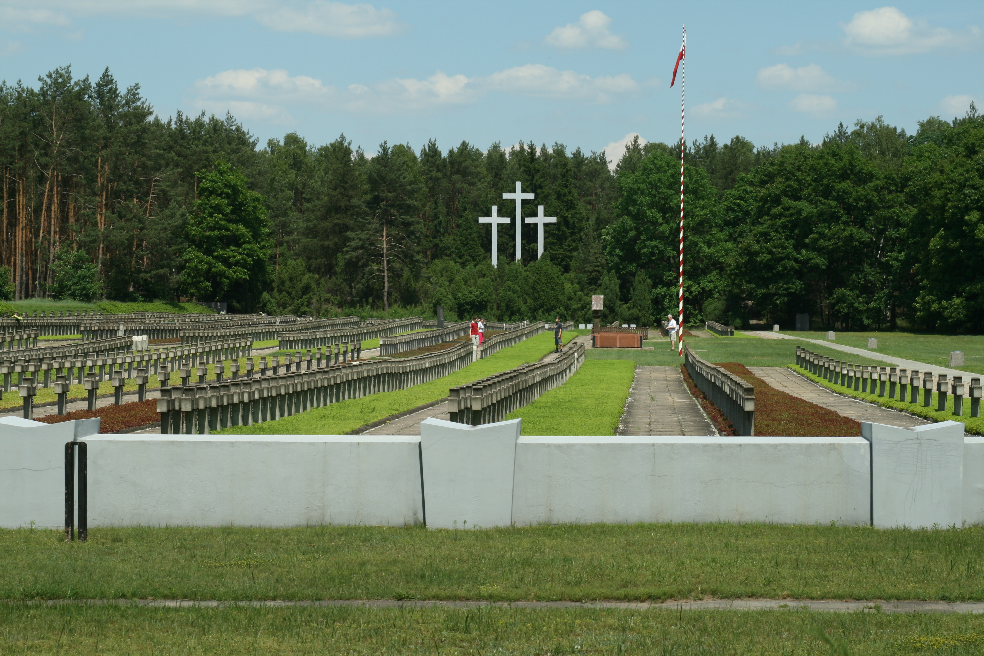 Cmentarz w Palmirach. Miejsce pochówku ponad 1700 osób zamordowanych przez Niemców w latach 1939-1941.